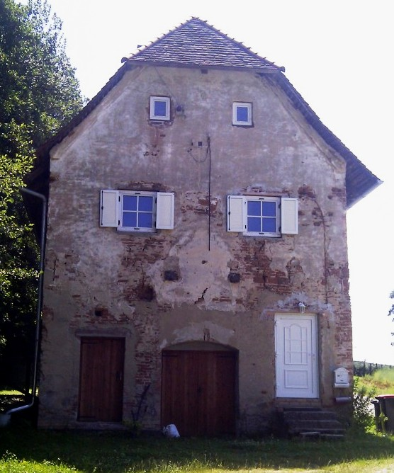 Kellerstöckel, Ludersdorf